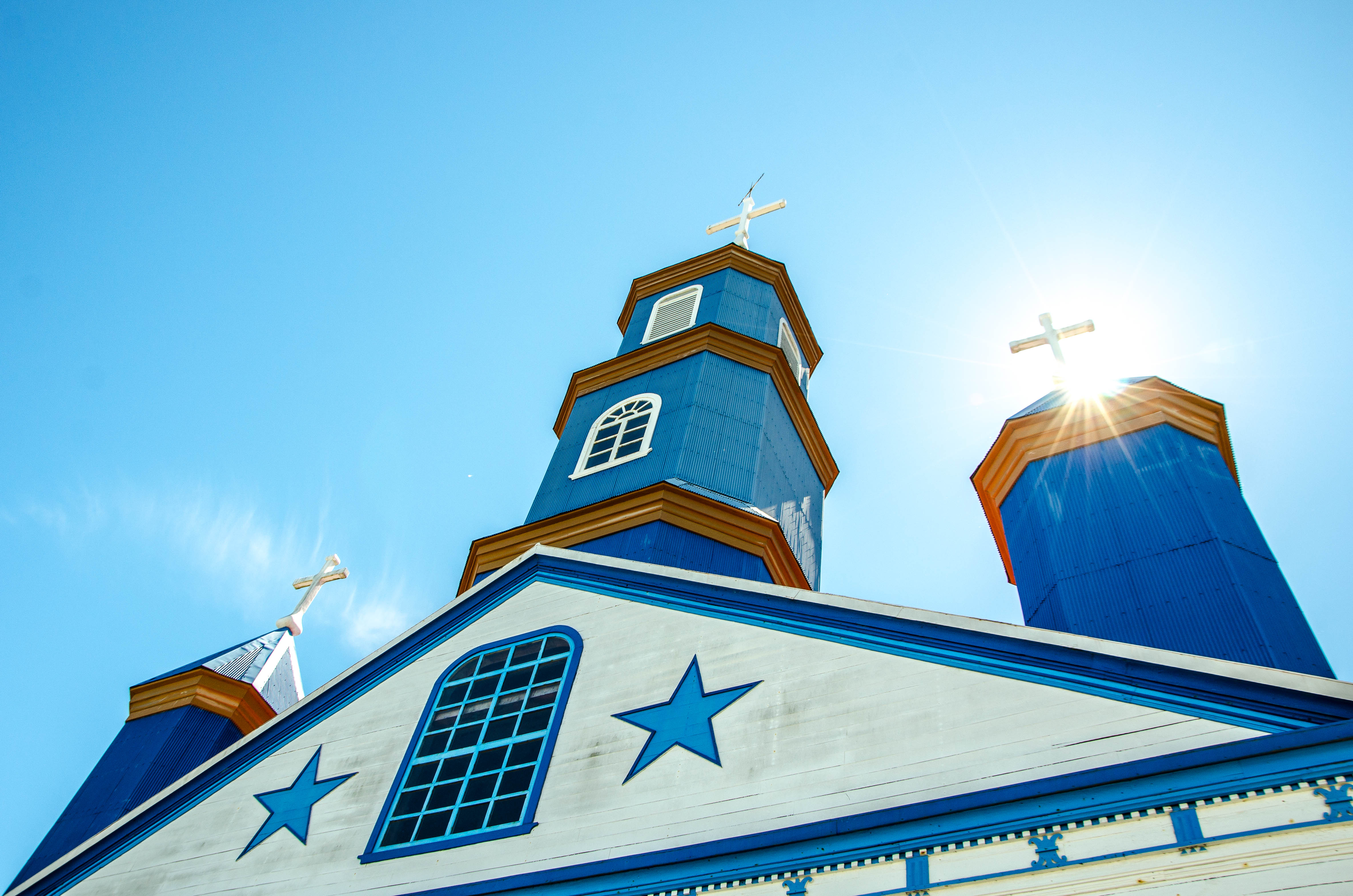 Dalcahue, Region de los Lagos, Chile